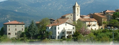 Vue général d'Ucciani